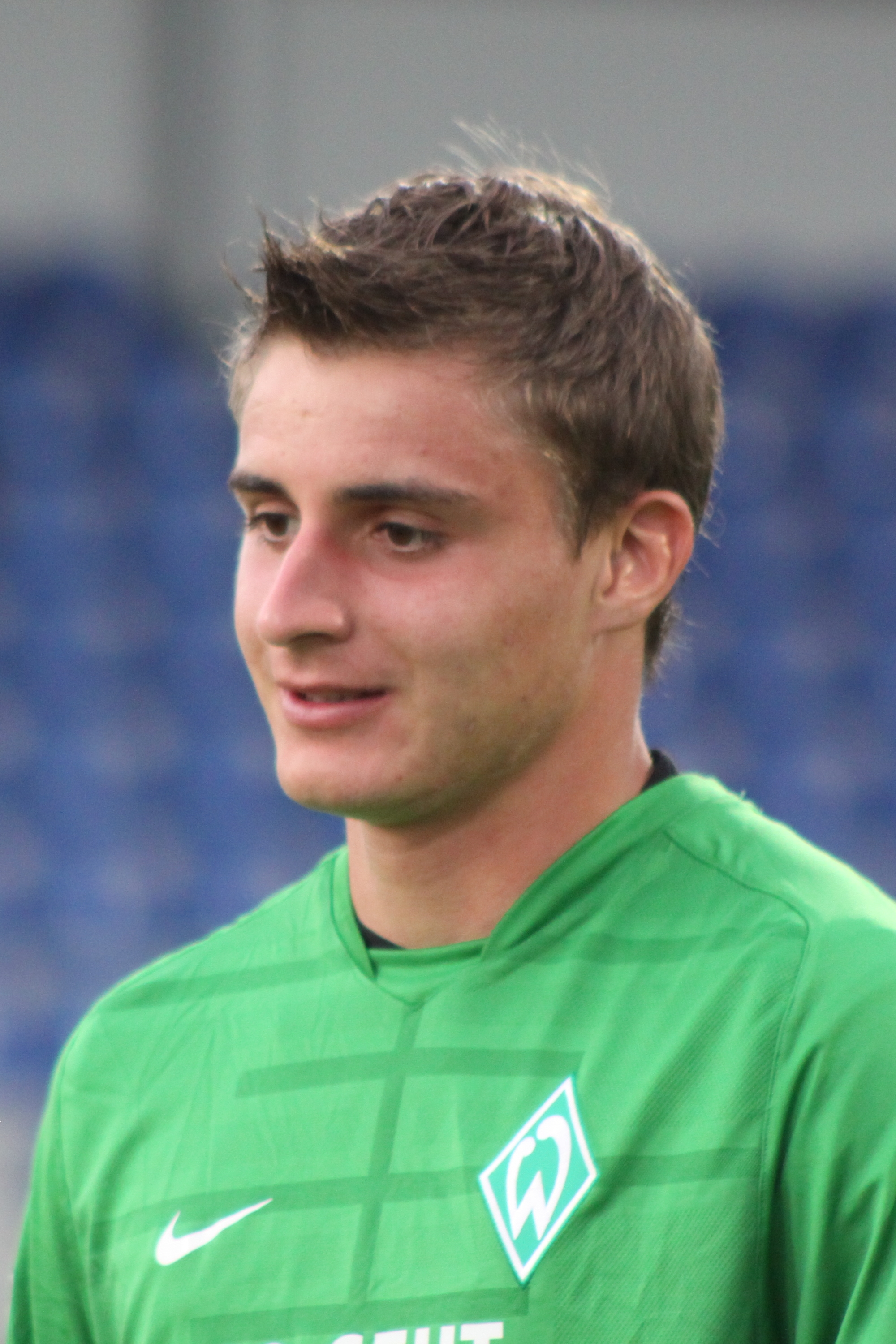 Sebastian Mielitz - SV Werder Bremen (1)